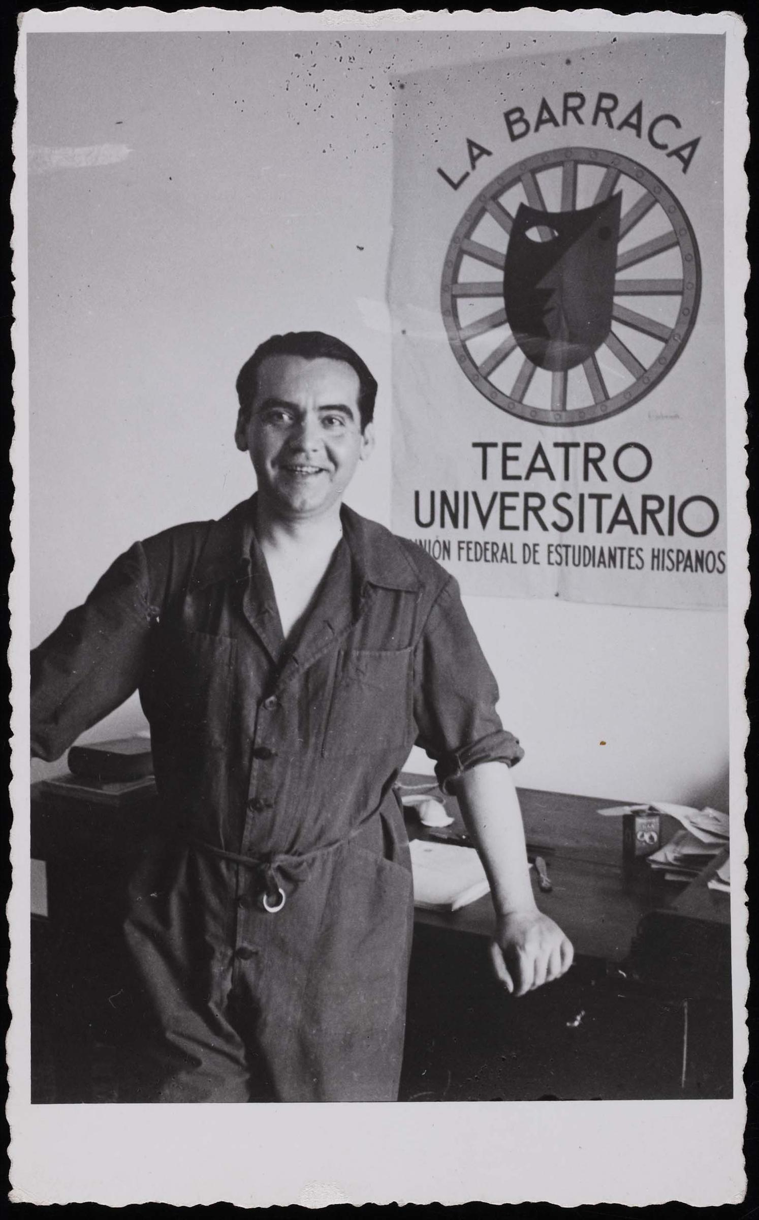 Federico García Lorca. Huerta de San Vicente, Granada